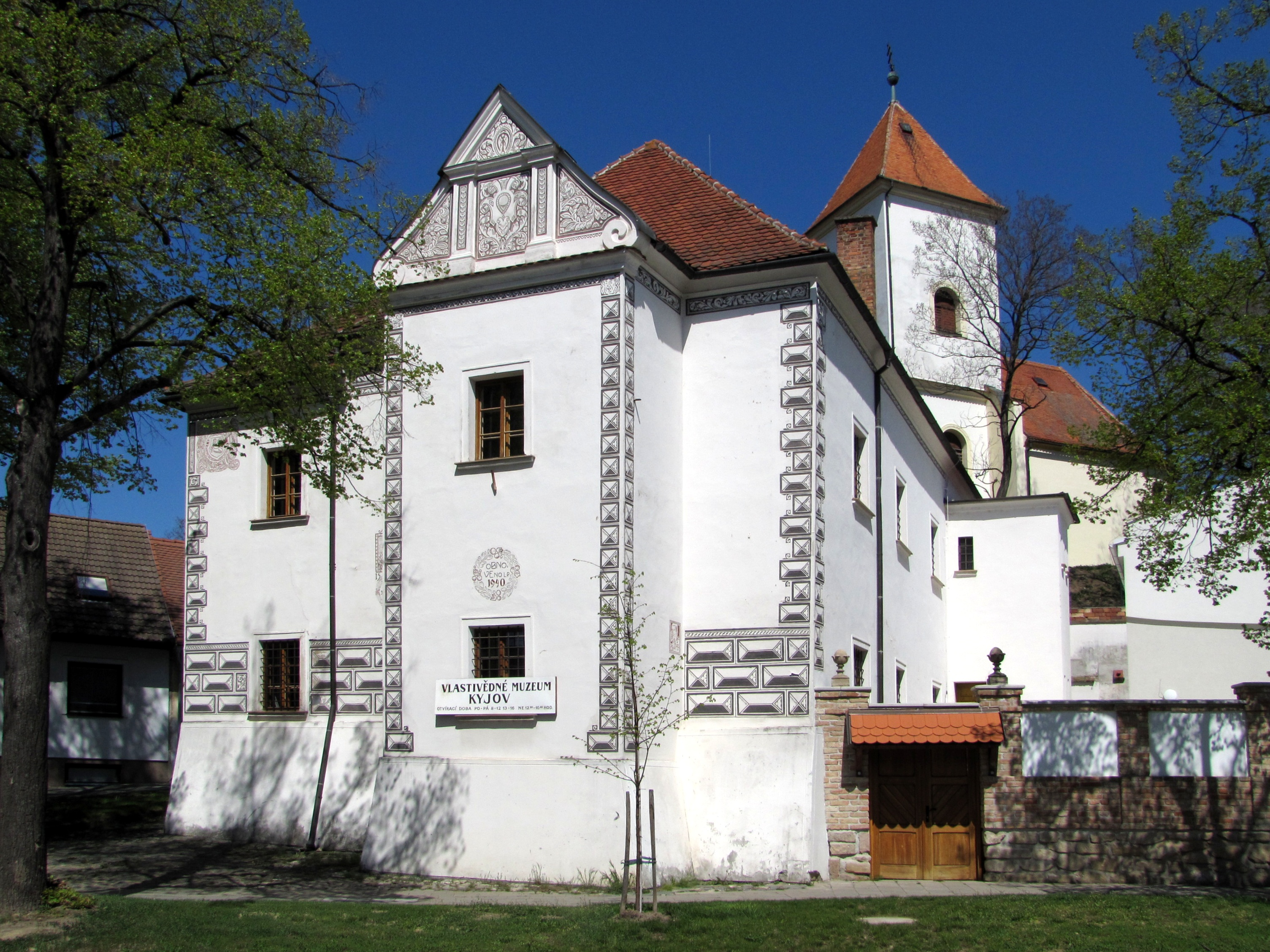 Renesanční zámek v Kyjově z roku 1548 vyzdobený sgrafity Jano Köhlera. Dnes sídlo Vlastivědného muzea.